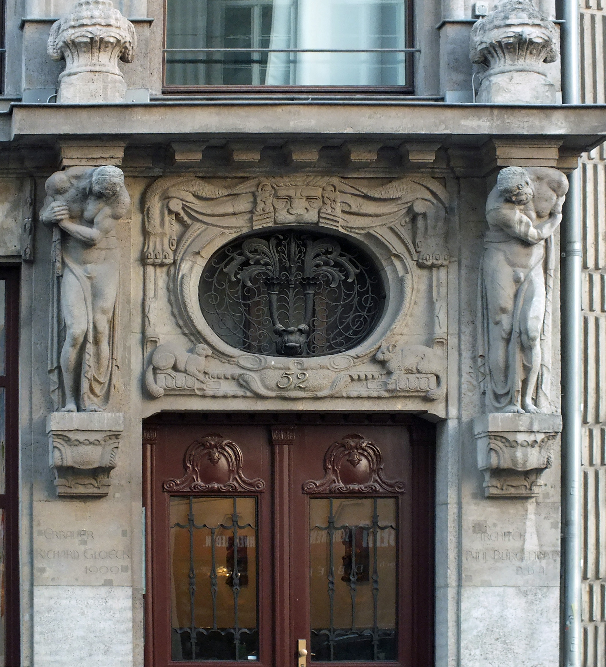 Portal von Gloecks Haus Leipzig